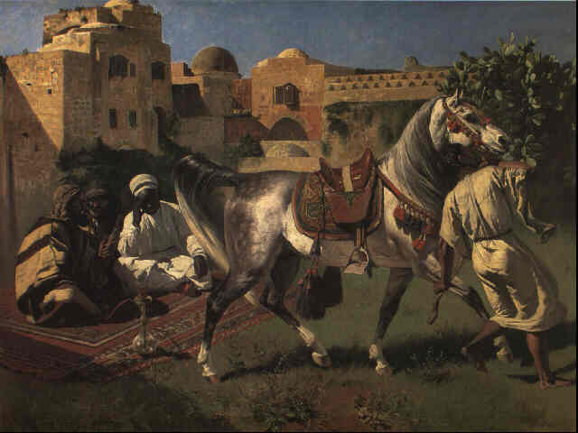 Un cheval arab, Jerusalem